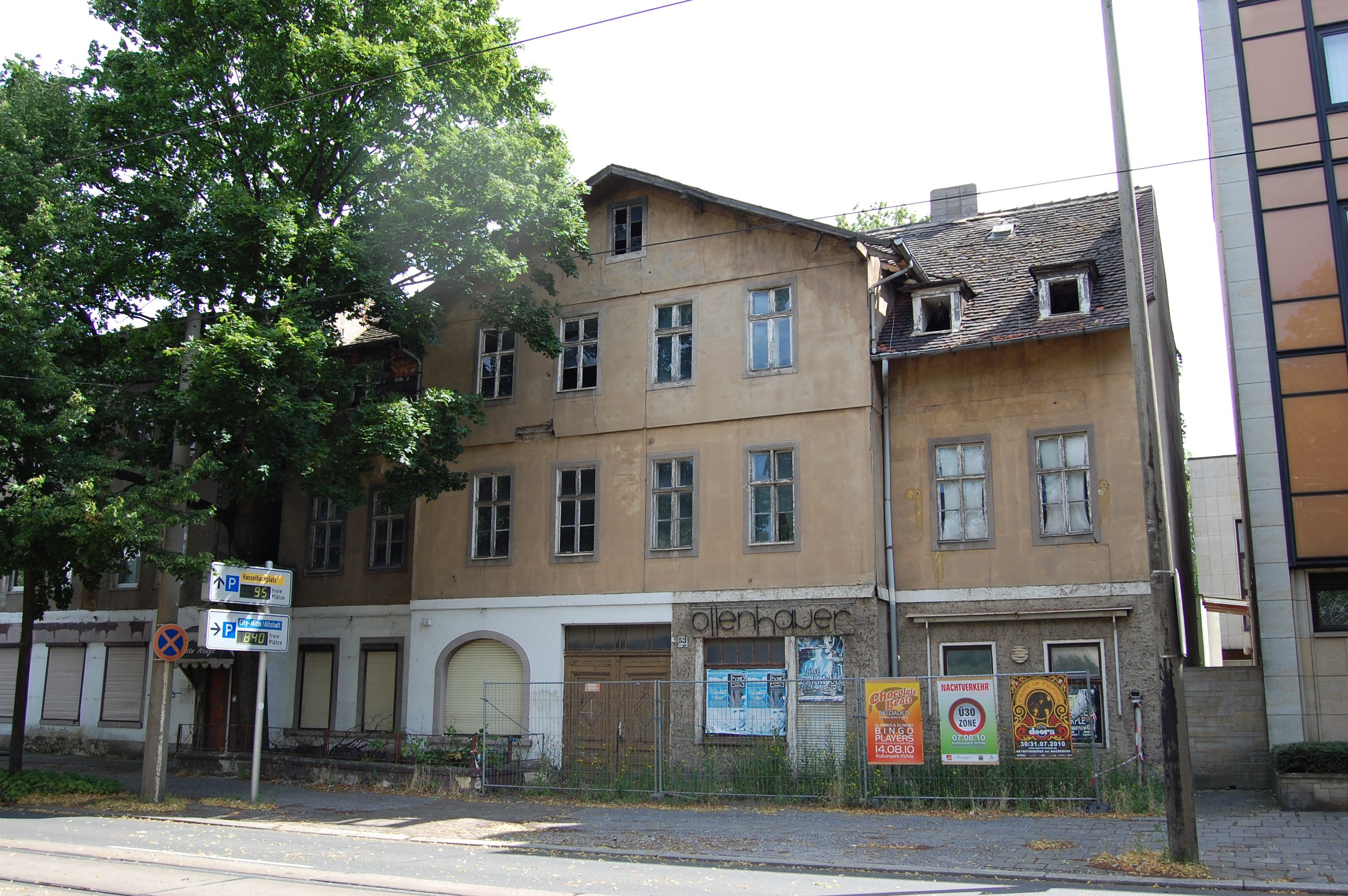 Wohnhaus Leipziger Straße 53, Magdeburg, Fachwerkbau von 1879, Baudenkmal, Rayonhaus